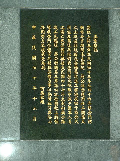 1981年12月，金門縣太武山，由何應欽撰寫之陸軍金門防衛司令部紀念前司令劉玉章上將的碑牌。